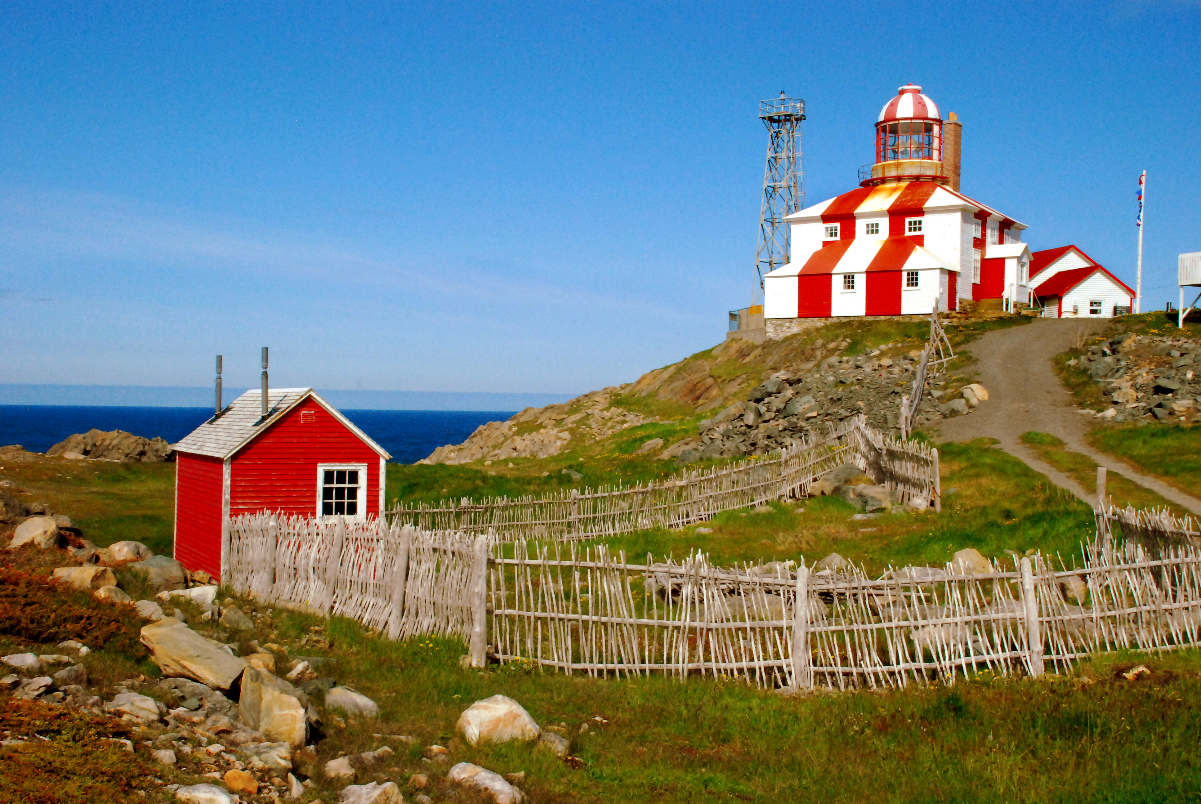 Cape Bonavista Lighthouse, Terre-Neuve et Labrador